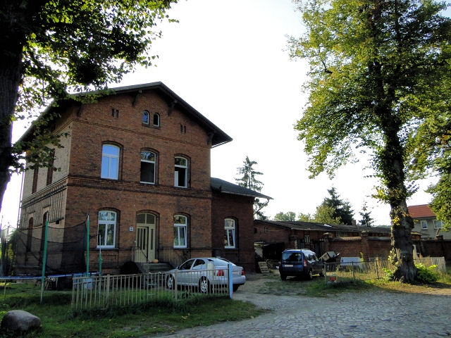 Wohnhaus neben dem Empfangsgebäude des Bahnhofs Grabow (Meckl) - Typischer Baustil von Bahngebäuden der Zeit